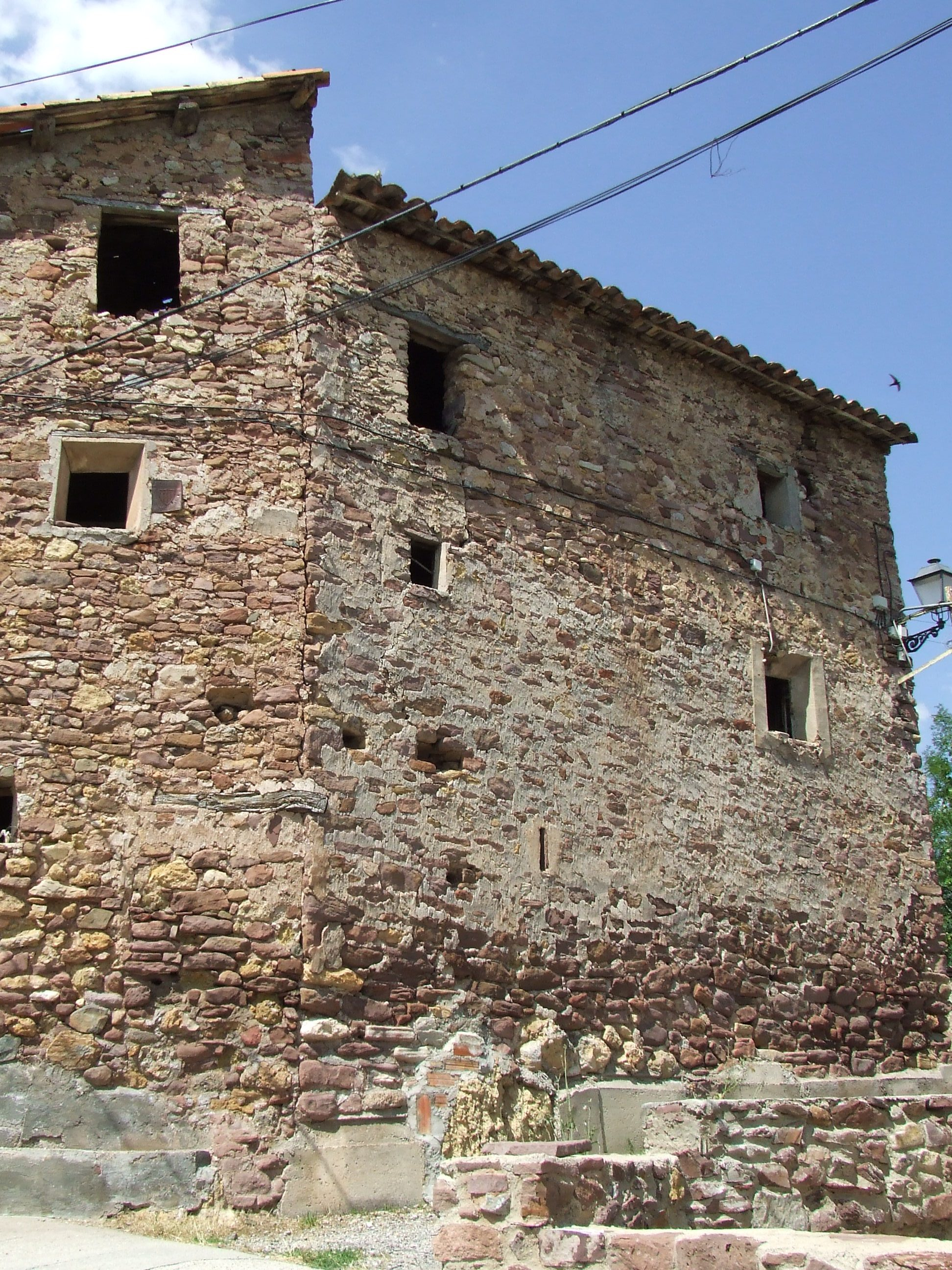 Una de les cases antigues de les Esglésies (Sarroca de Bellera, Pallars Jussà)